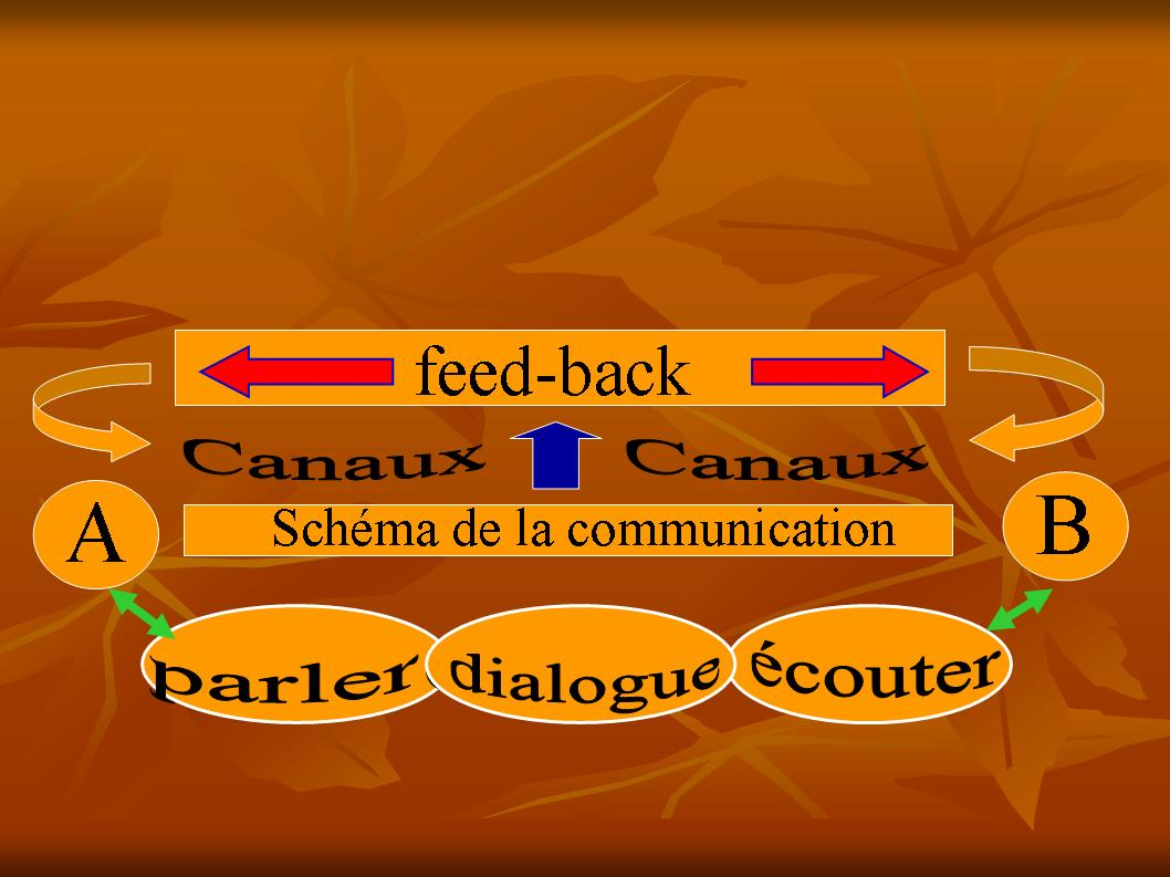 Les principes de la communication